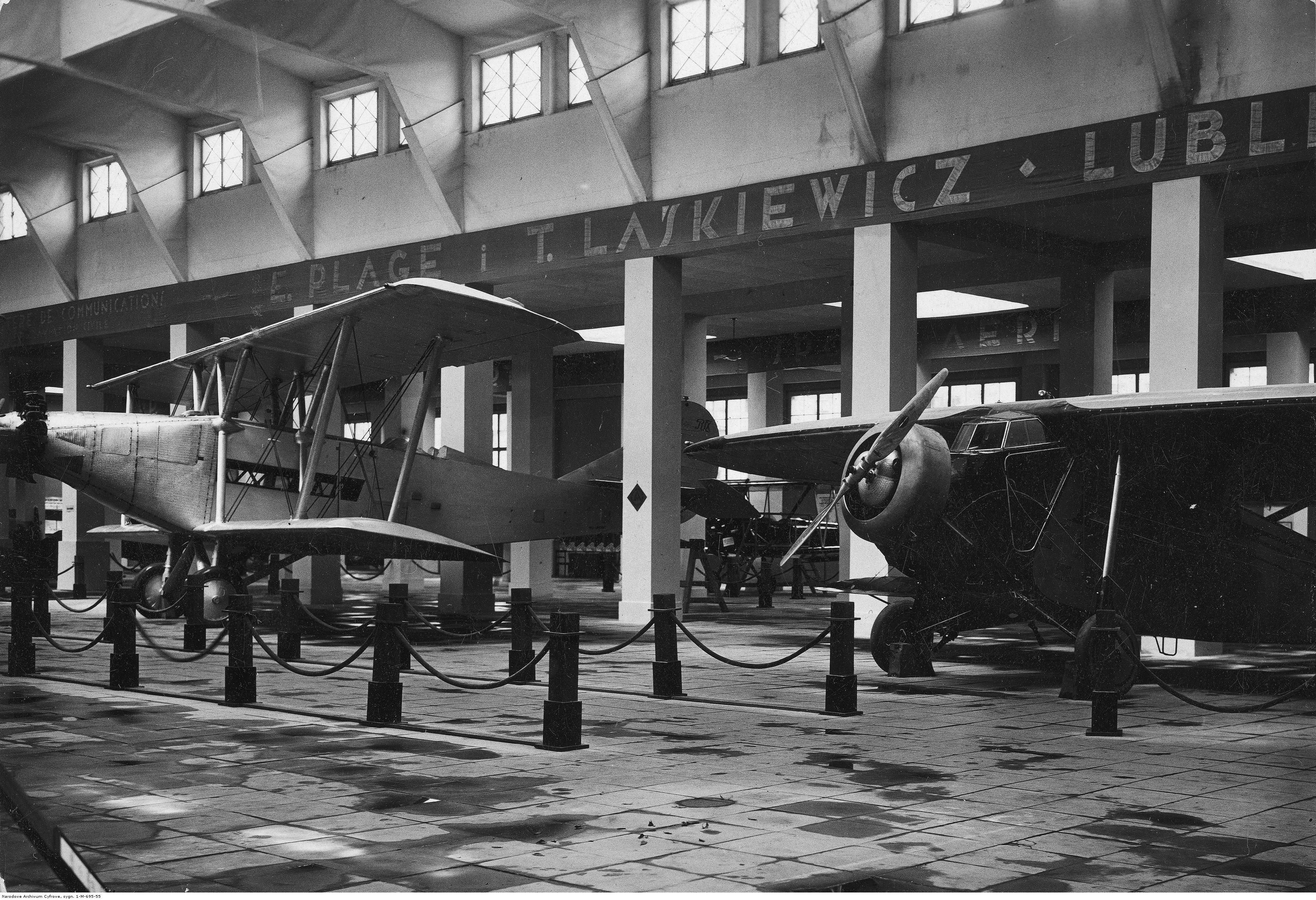 Samoloty Lublin R-IX (z lewej) i Lublin R-XI (z prawej) na stoisku Zakładów Mechanicznych E. Plage i T. Laśkiewicz na Międzynarodowej Wystawie Komunikacji i Turystyki w Poznaniu.